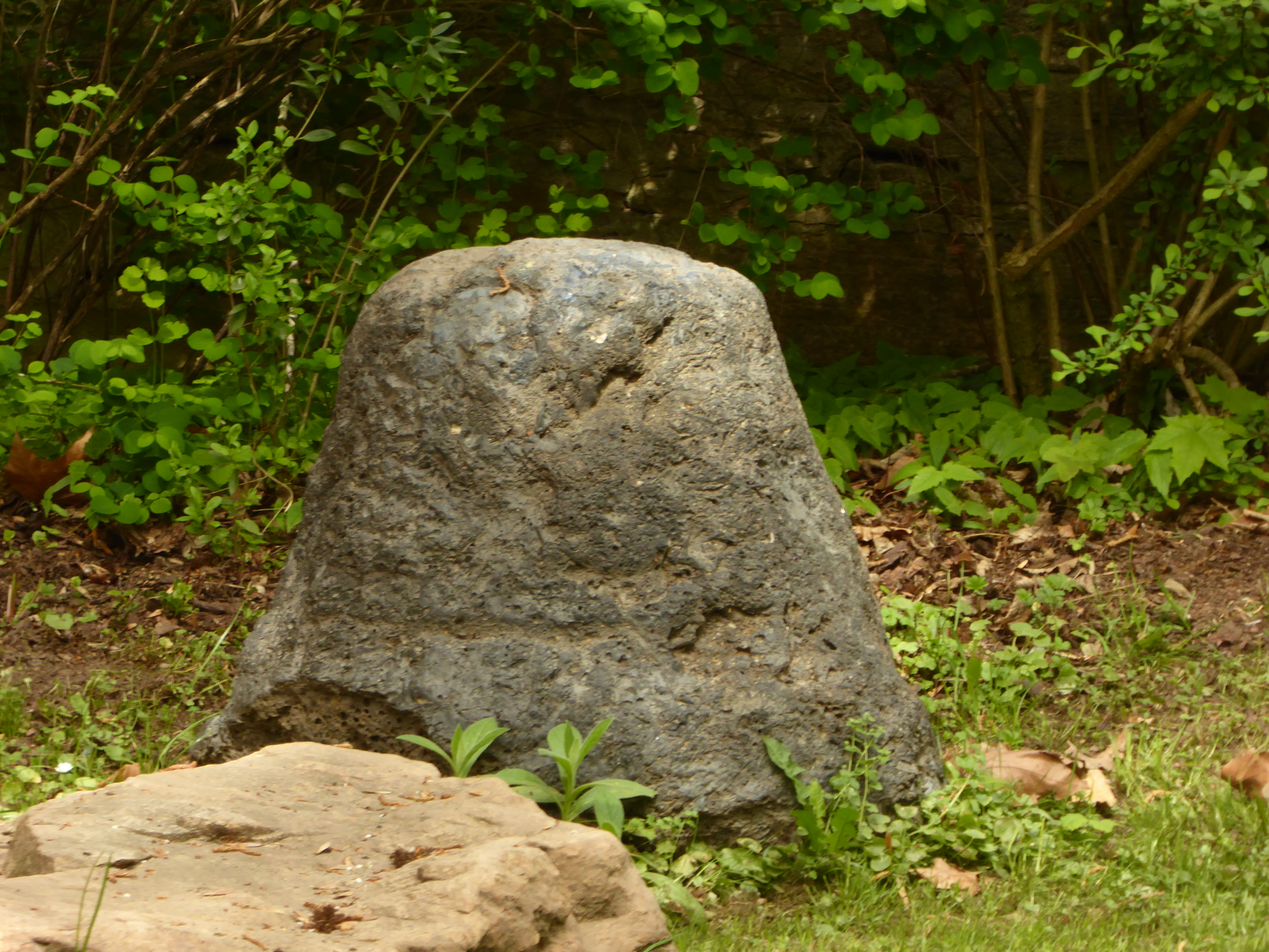 Auffälliger Schlackestein zwischen Kleindenkmalen im Außenbereich des Spengler-Museums in Sangerhausen. Mutmaßlich ein ehemaliger Viertelmeilenstein.